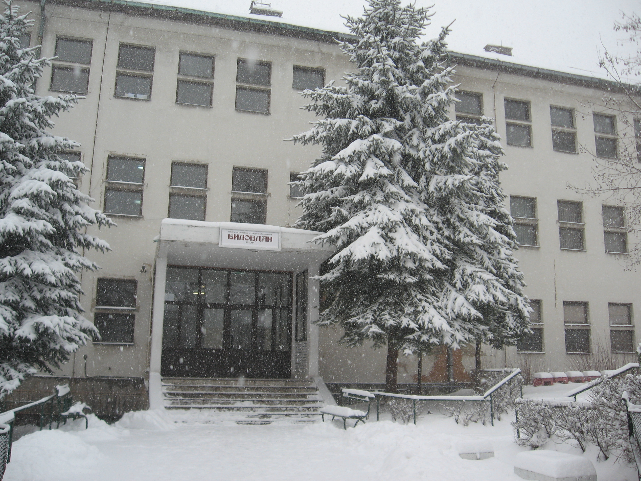 ŠOSO Vidovdan